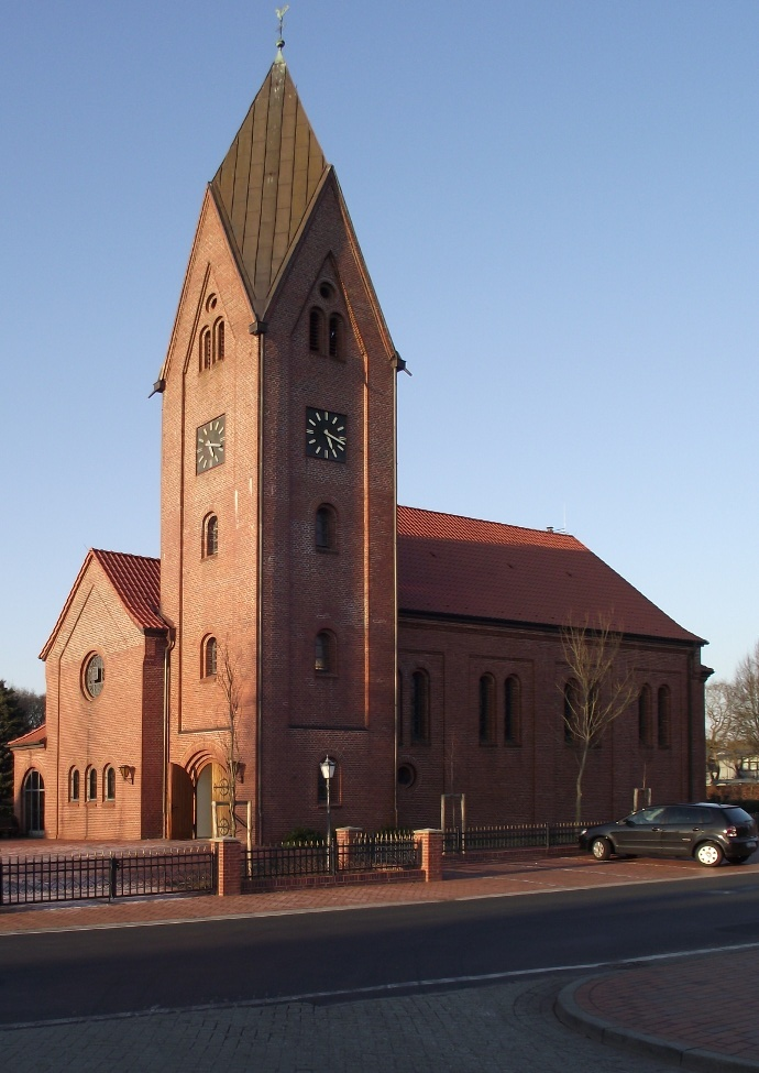 Herz Jesu Kirche in Lehe